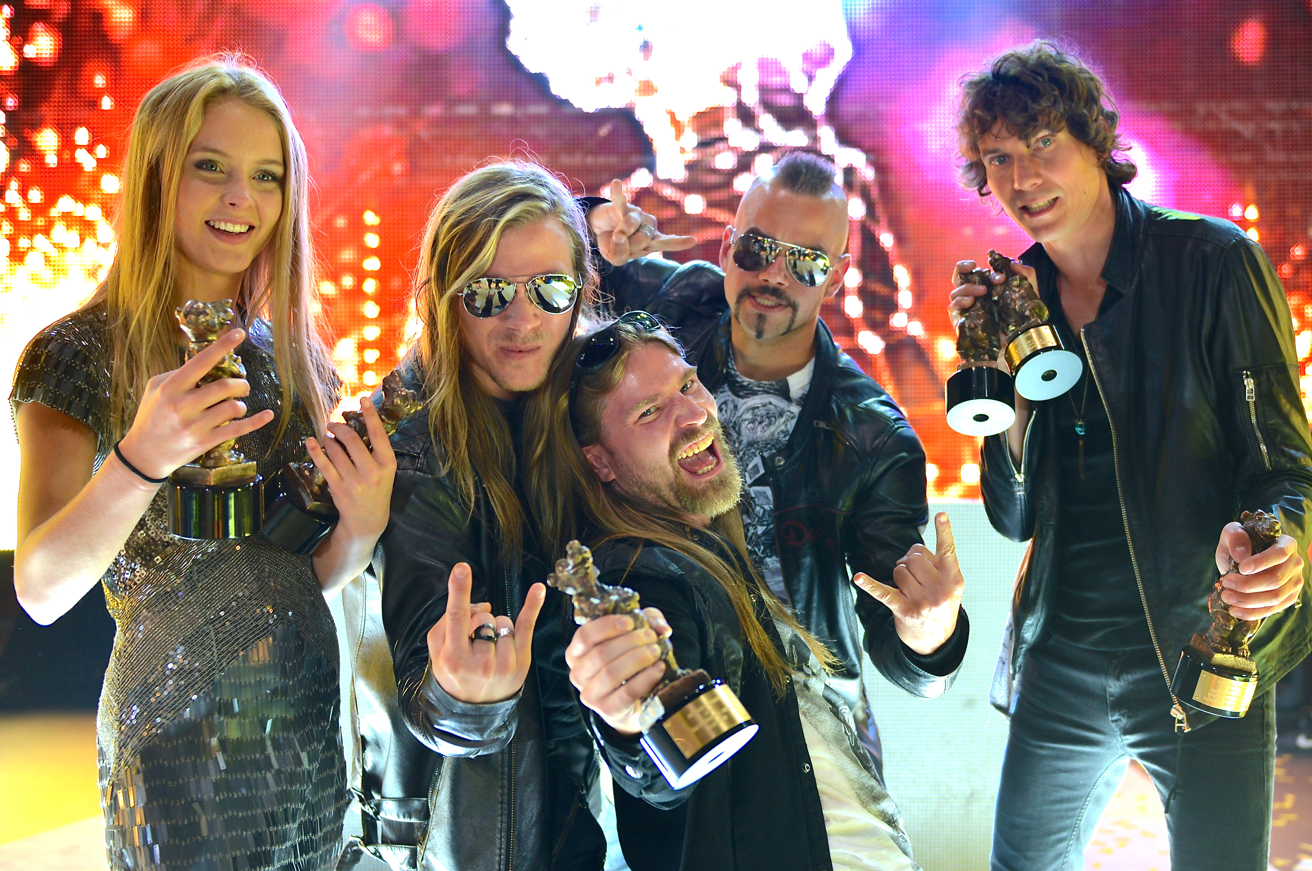 Rockbjörn-vinnarna Zara Larsson, Sabaton och Håkan Hellström, den 28 augusti 2013 på Gröna Lund i Stockholm.